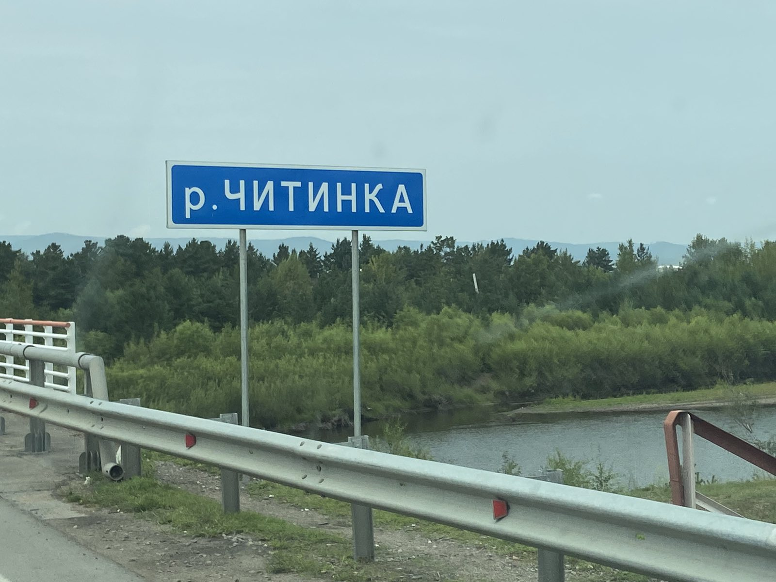 Bridge over the Chitinka river